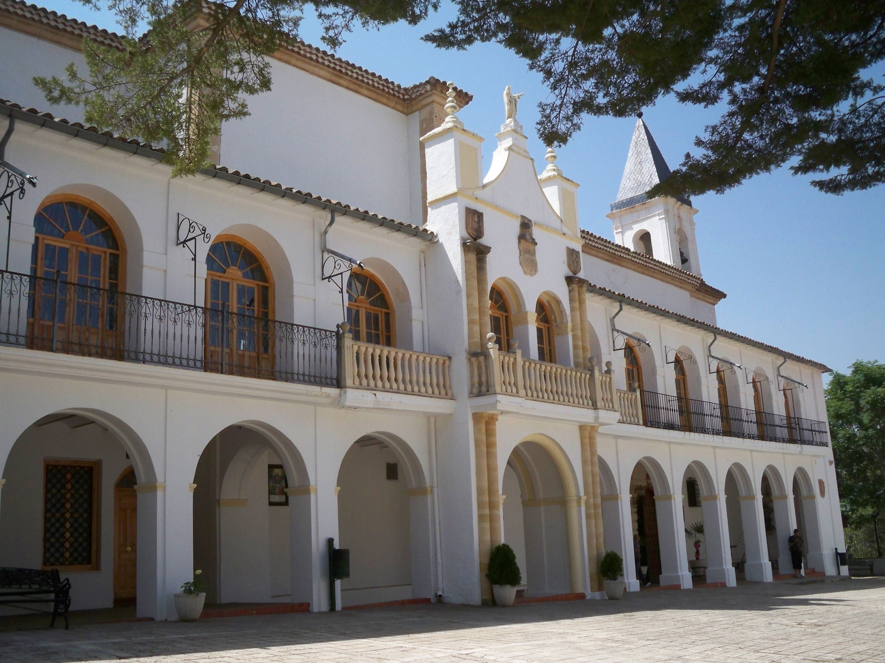 Interior del Santuario de Nuestra Señora de Cortes (Alcaraz- Albacete)